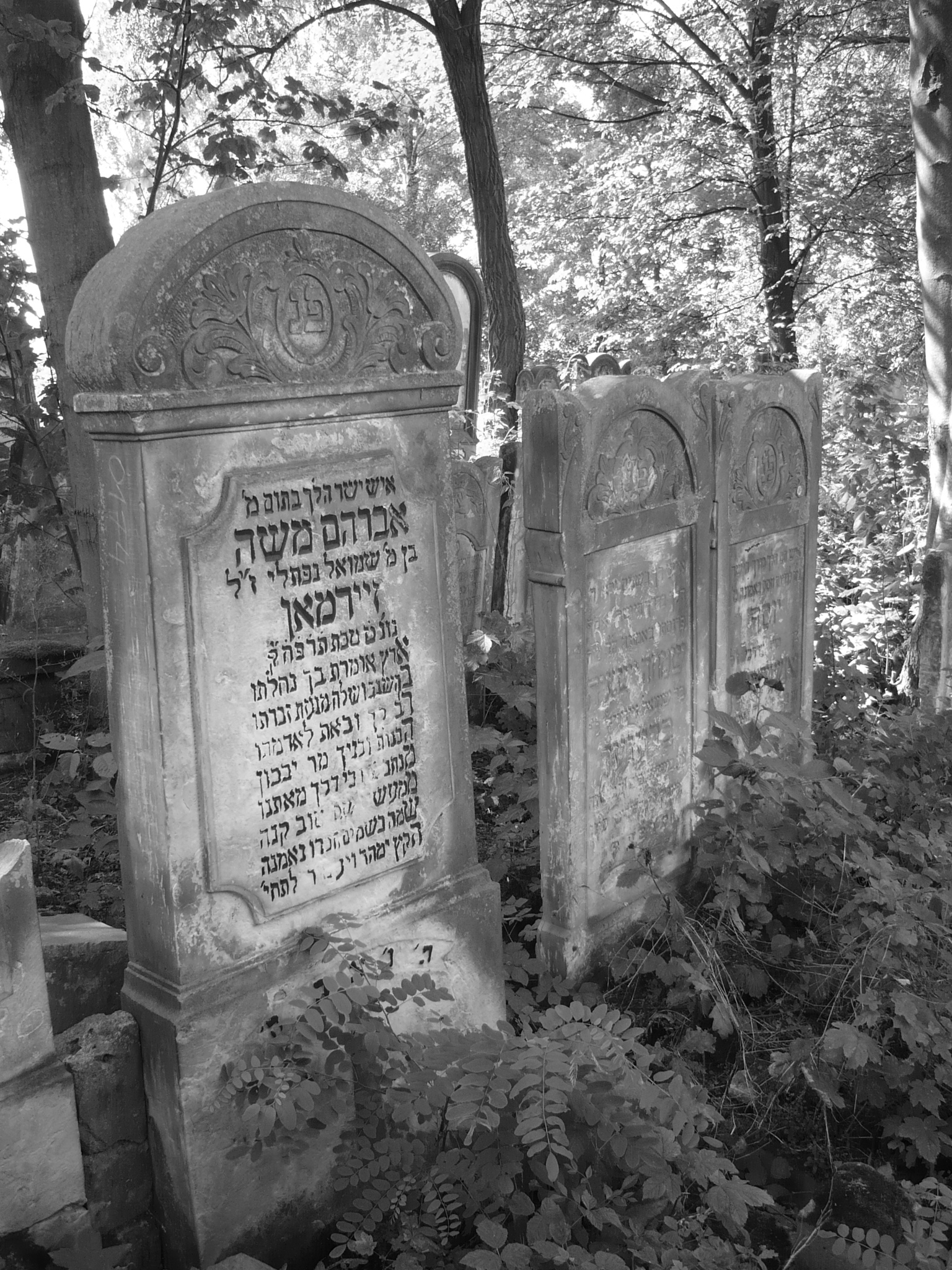 Macewy na cmentarzu żydowskim w Radomsku